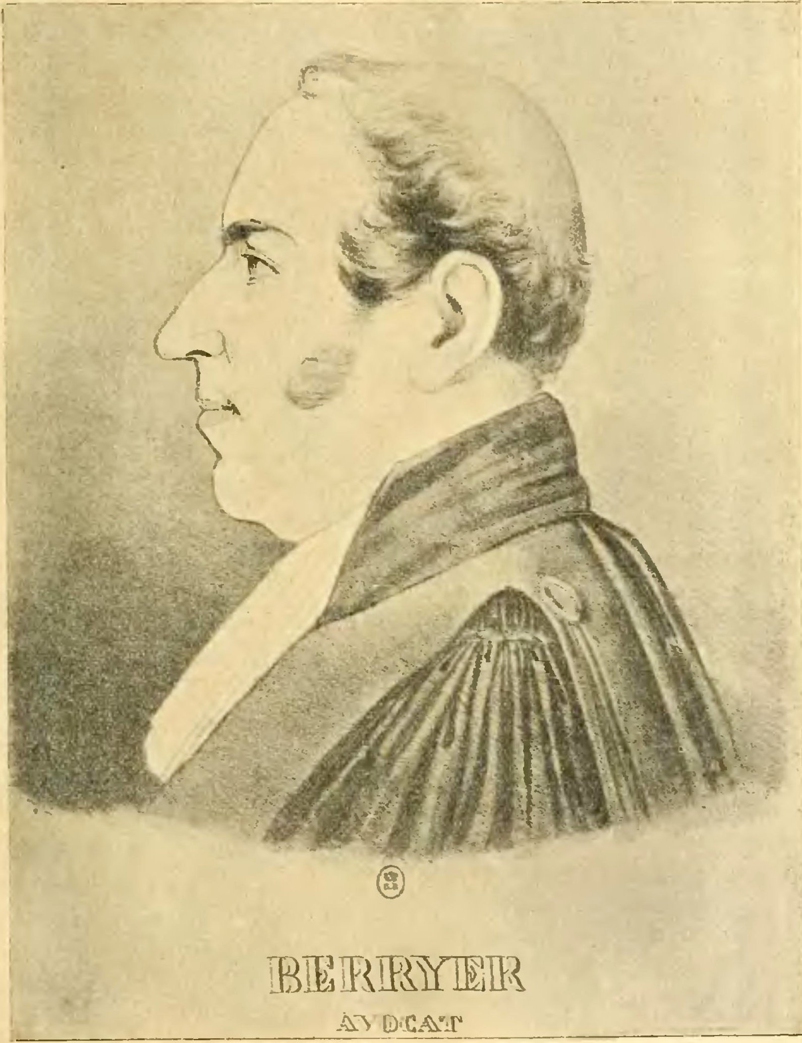 Histoire socialiste sous la direction de Jean Jaurès 1908, Volume 8, Le règne de Louis-Philippe, illustration page 493